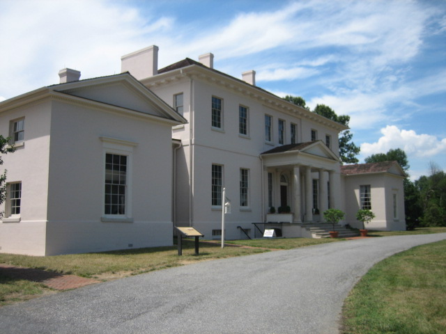 Riversdale